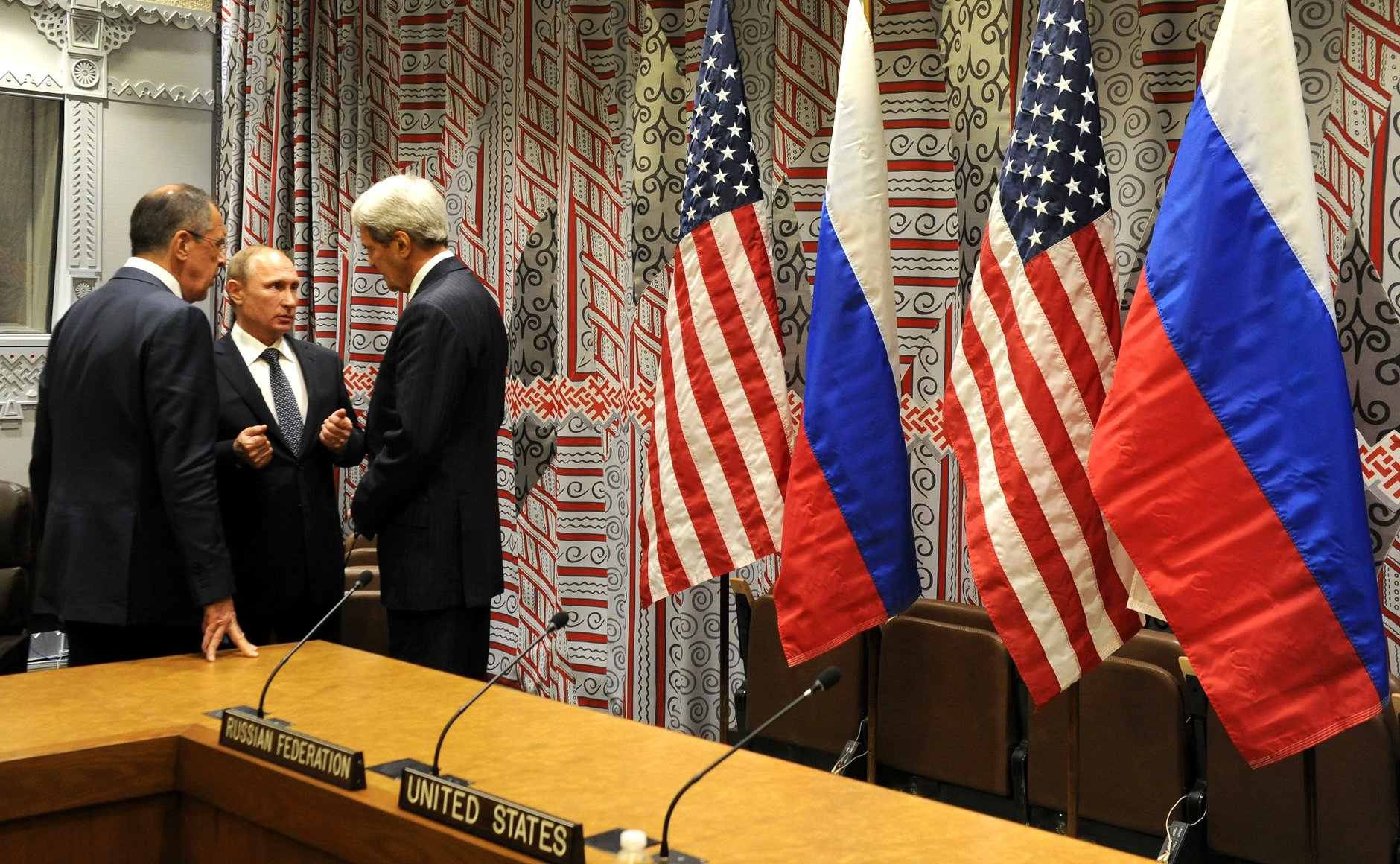 По окончании встречи с Президентом США Бараком Обамой. Владимир Путин с Министром иностранных дел Сергеем Лавровым и госсекретарём США Джоном Керри